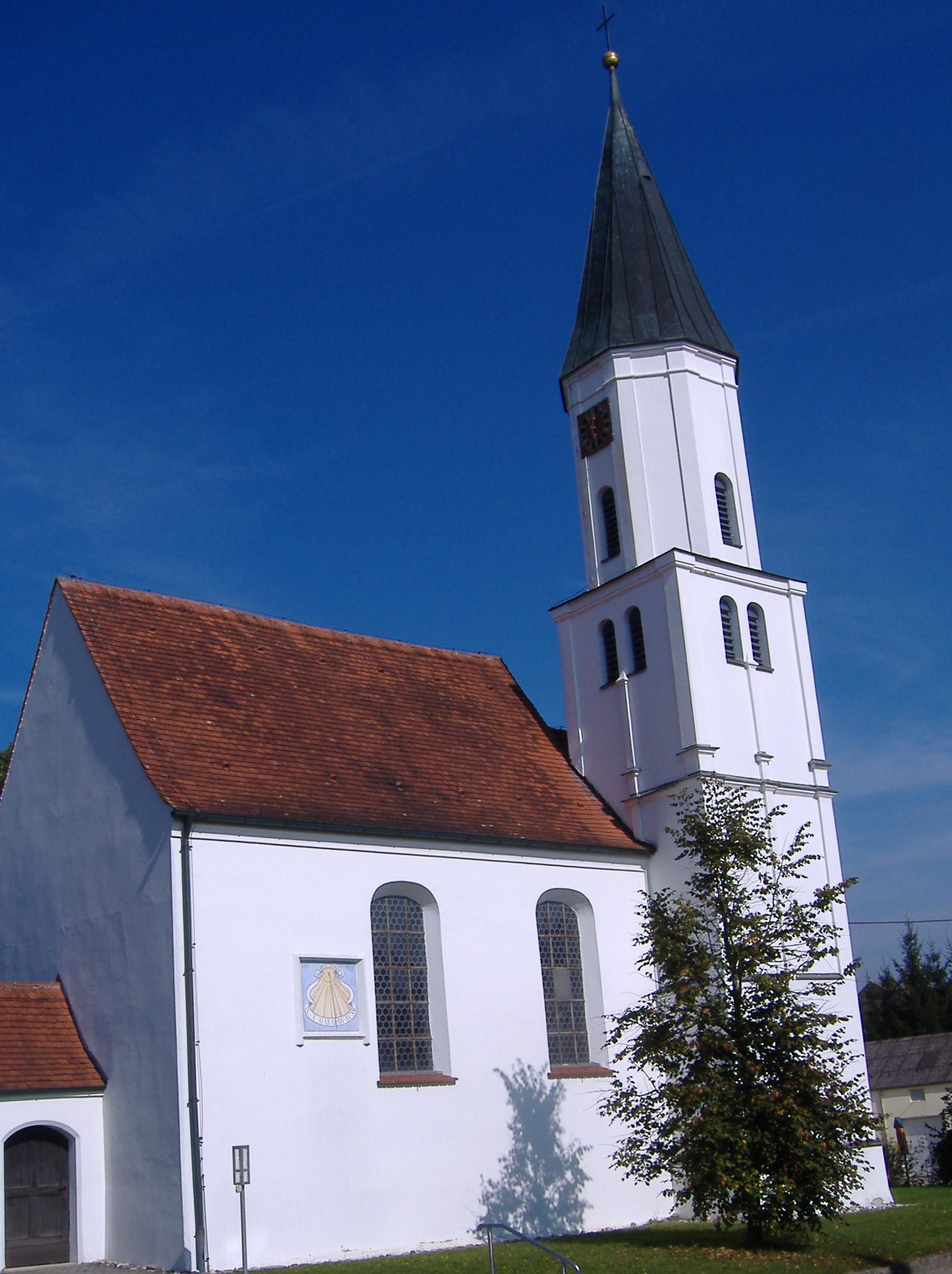 Mittelstetten (Rain am Lech)